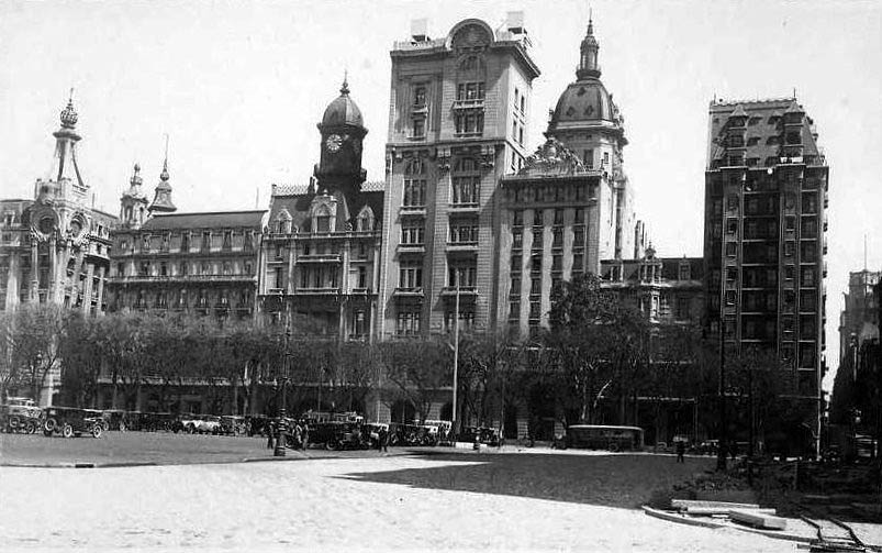 Vista de la Avenida Leandro N. Alem entre las calles Sarmiento y Cangallo (hoy Perón), desde la Plaza del Correo en Buenos Aires. Se ven, de izquierda a derecha: el edificio de la Compañía Naviera Mihanovich, el Palace Hotel, el Banco Hipotecario, el Archivo General de la Nación y edificios de oficinas y viviendas.